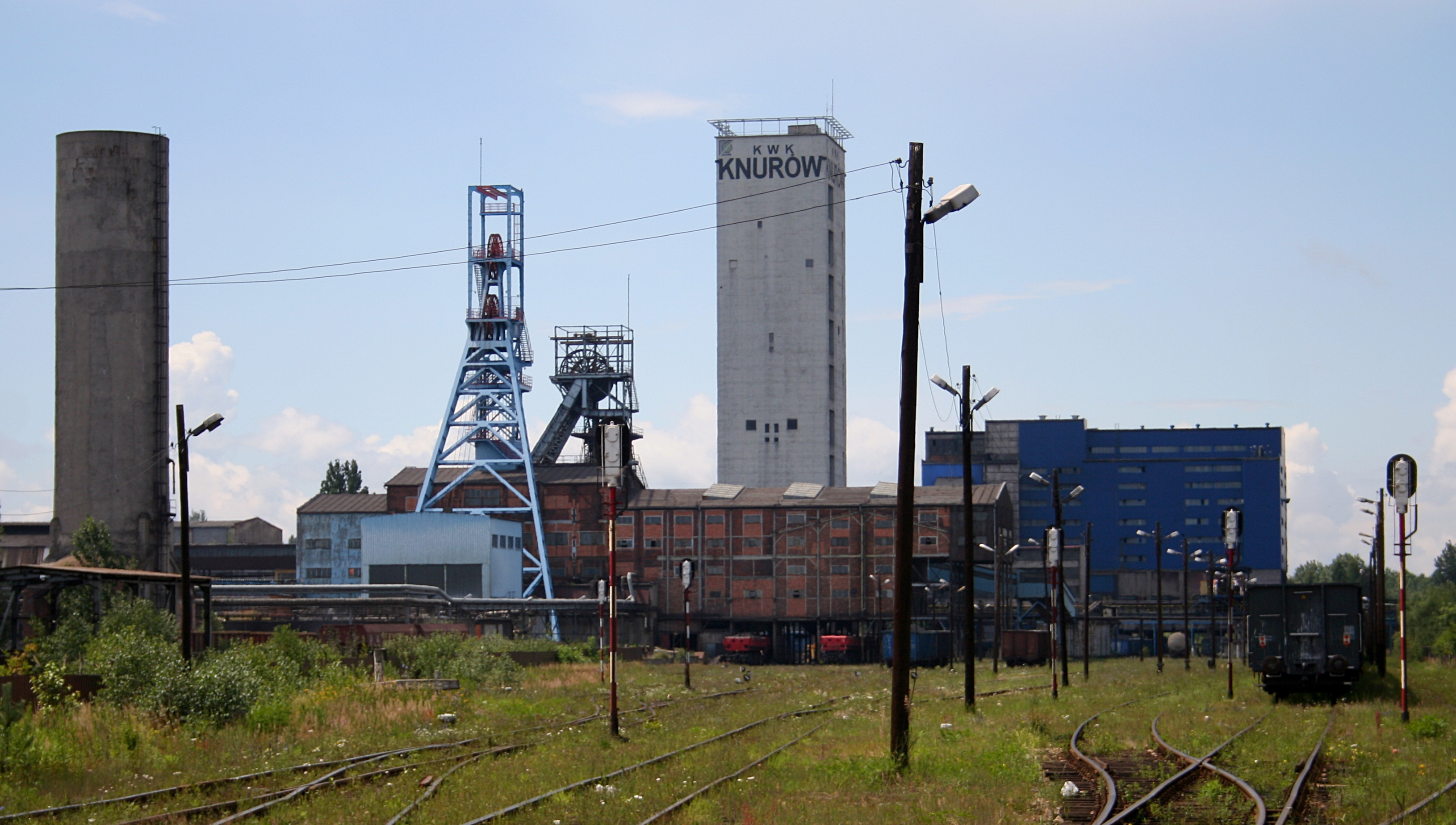 KWK Knurów